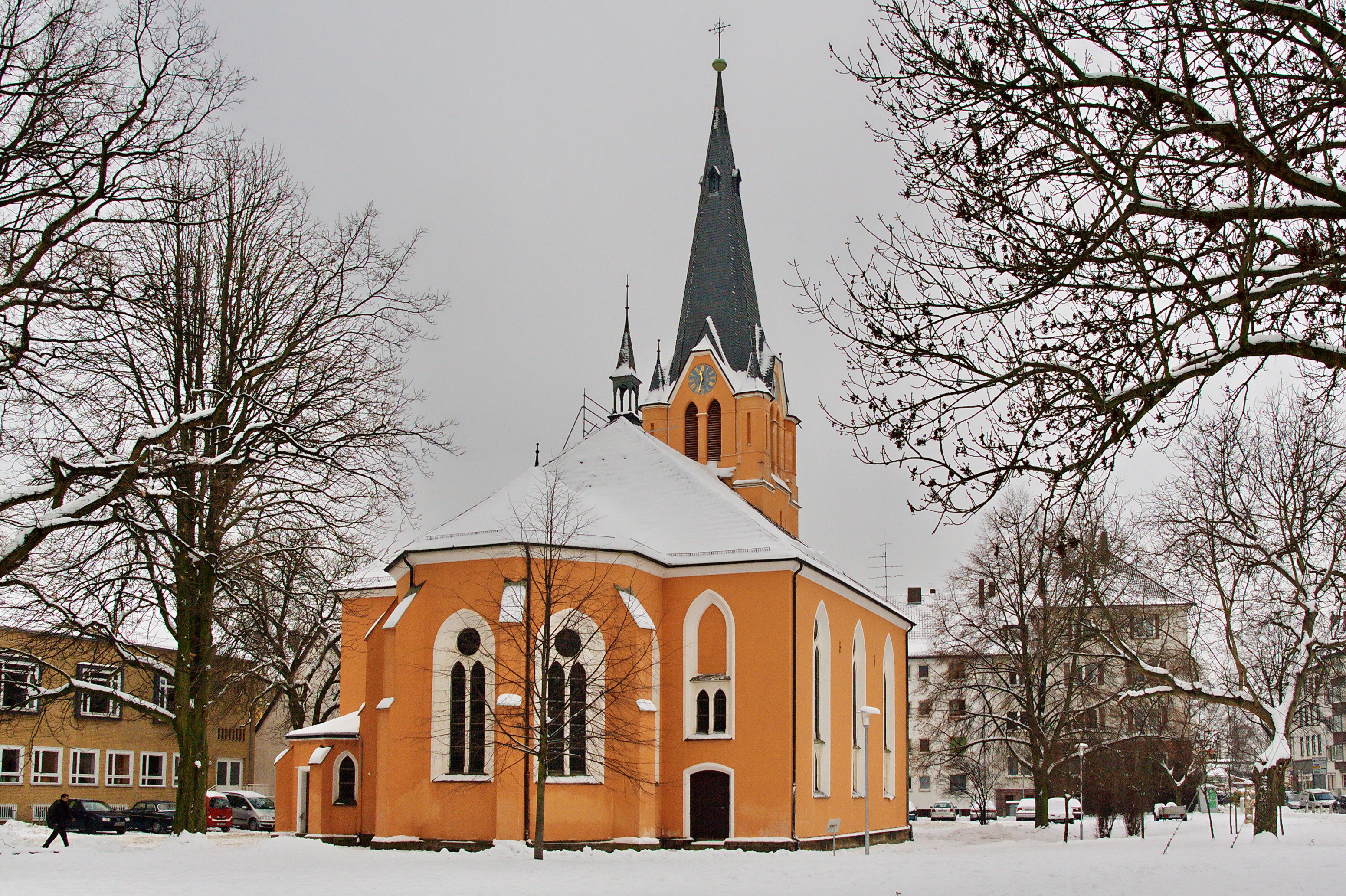 Ev.-luth. St.-Marien-Kirche in Hainholz (Hannover), Niedersachsen, Deutschland